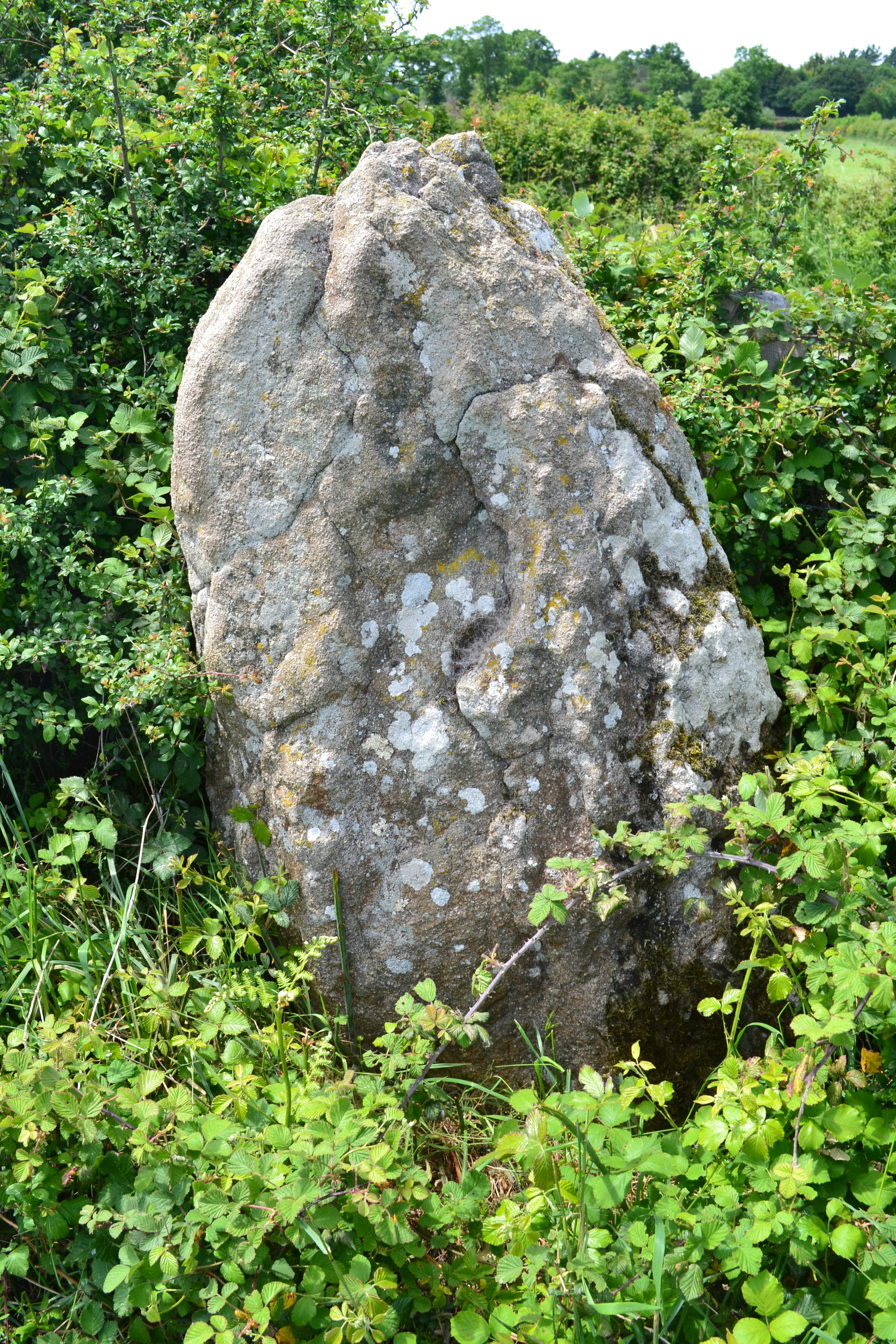 Menhir de Treffier, Besné, Loire-Atlantique